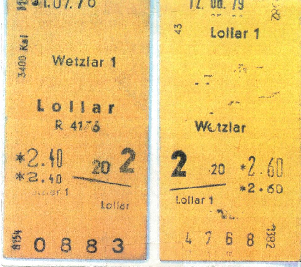 Original Edmonsonsche Fahrkarten der Fahrkartenausgabe Lollar aus 1978 und 79, selbst genutzt